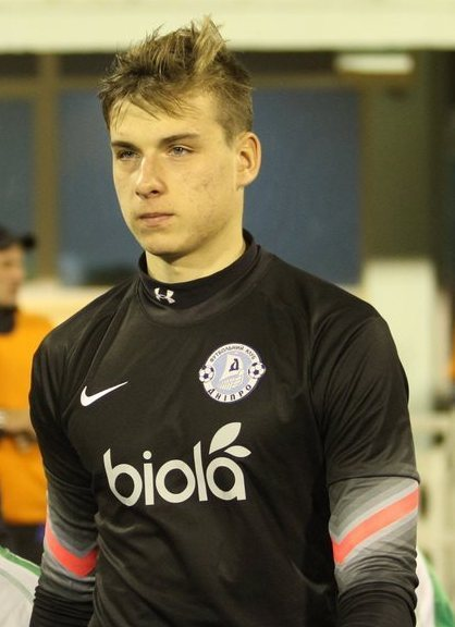 Андрій Лунін - український футболіст, воротар